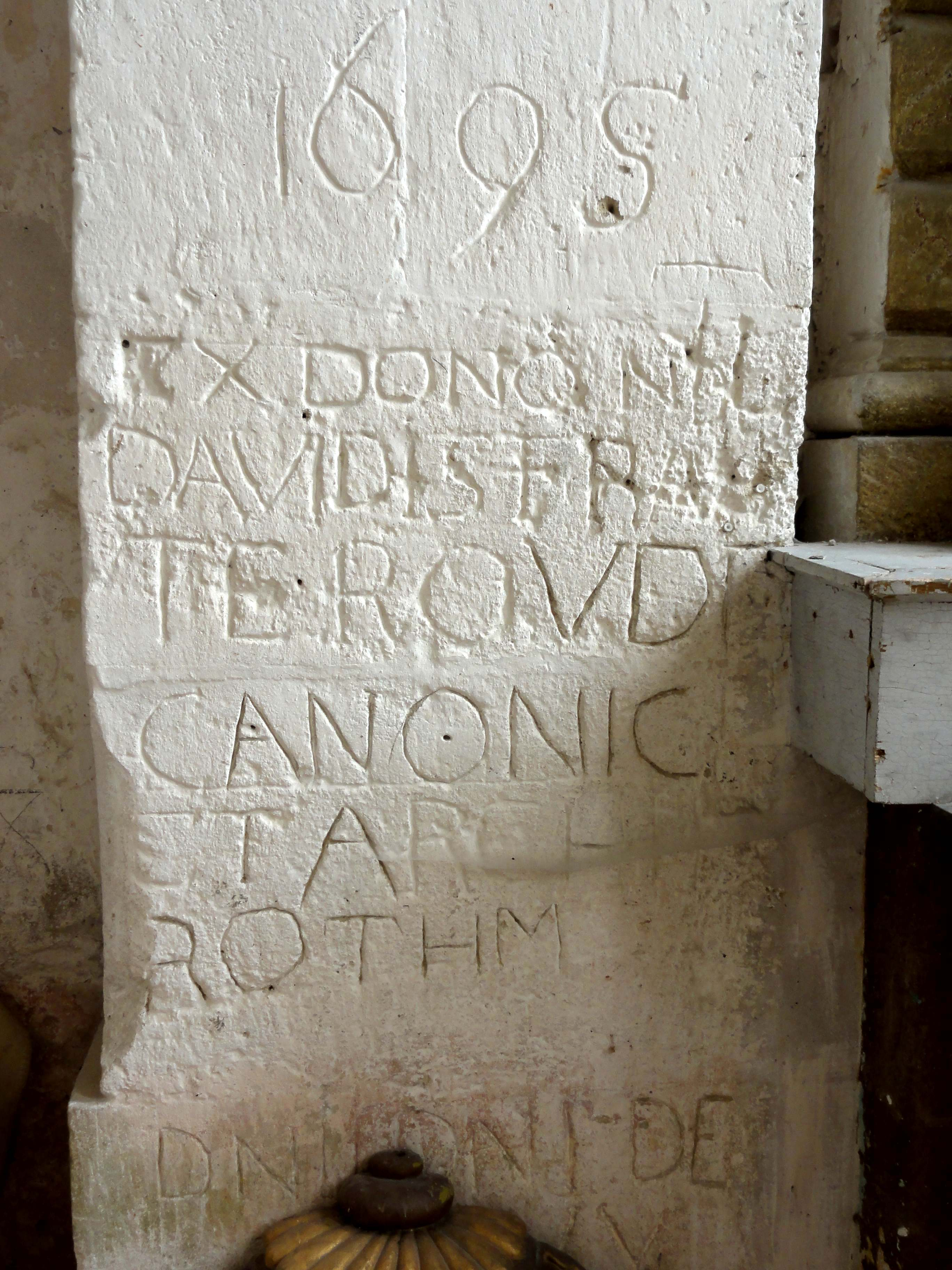 Intérieur de l'église (voir titre).